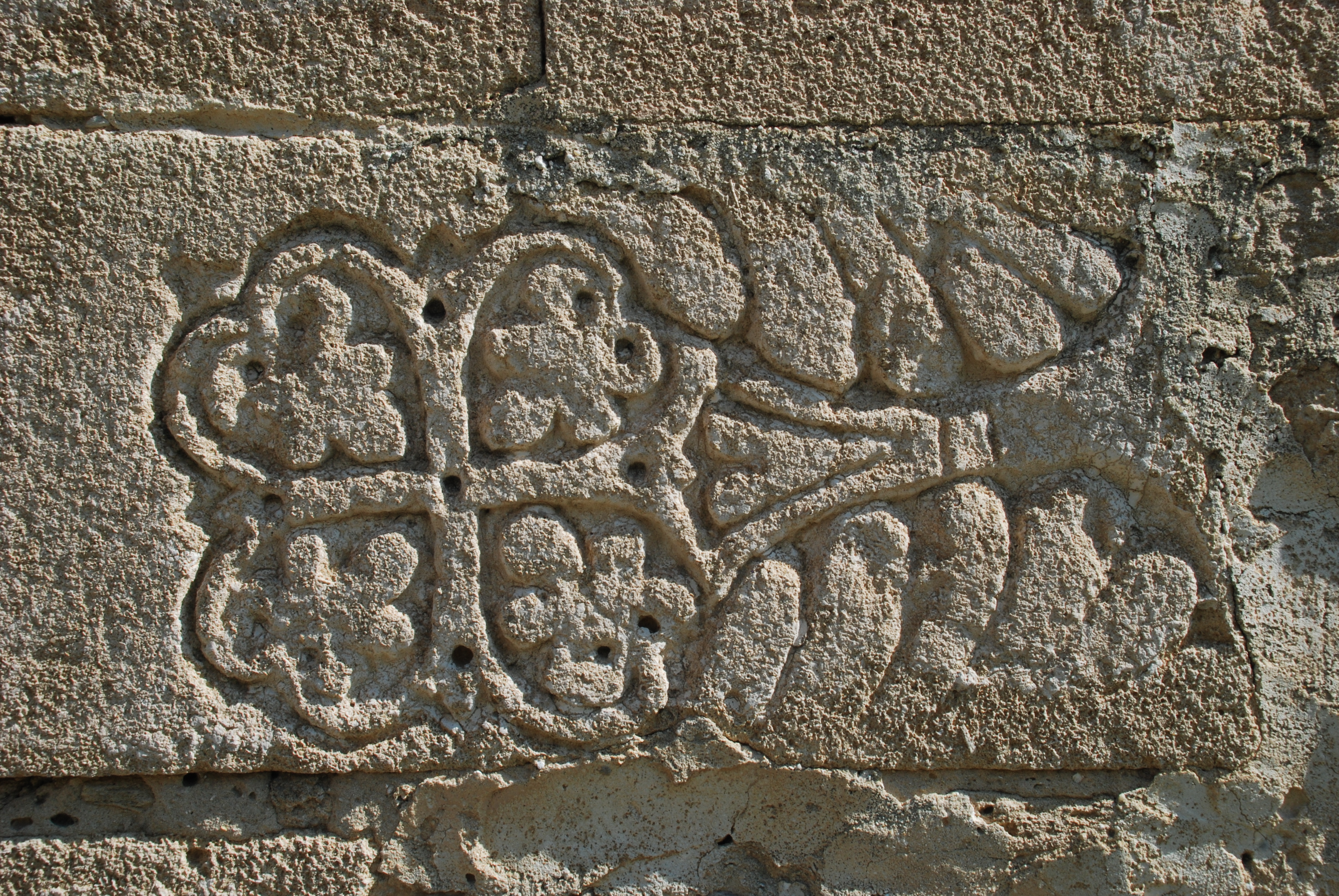 France - Provence - Sainte-Marguerite de Beaumont-du-Ventoux